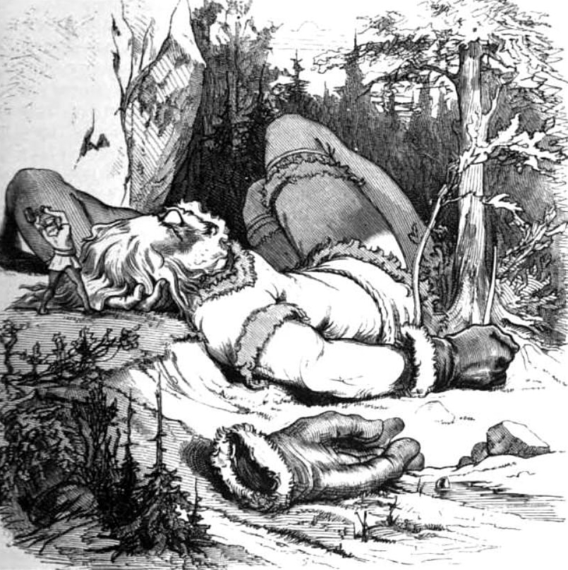 Der schlafende Skrymir, von Thor angegriffen. Thor attacks the sleeping Skrýmir.